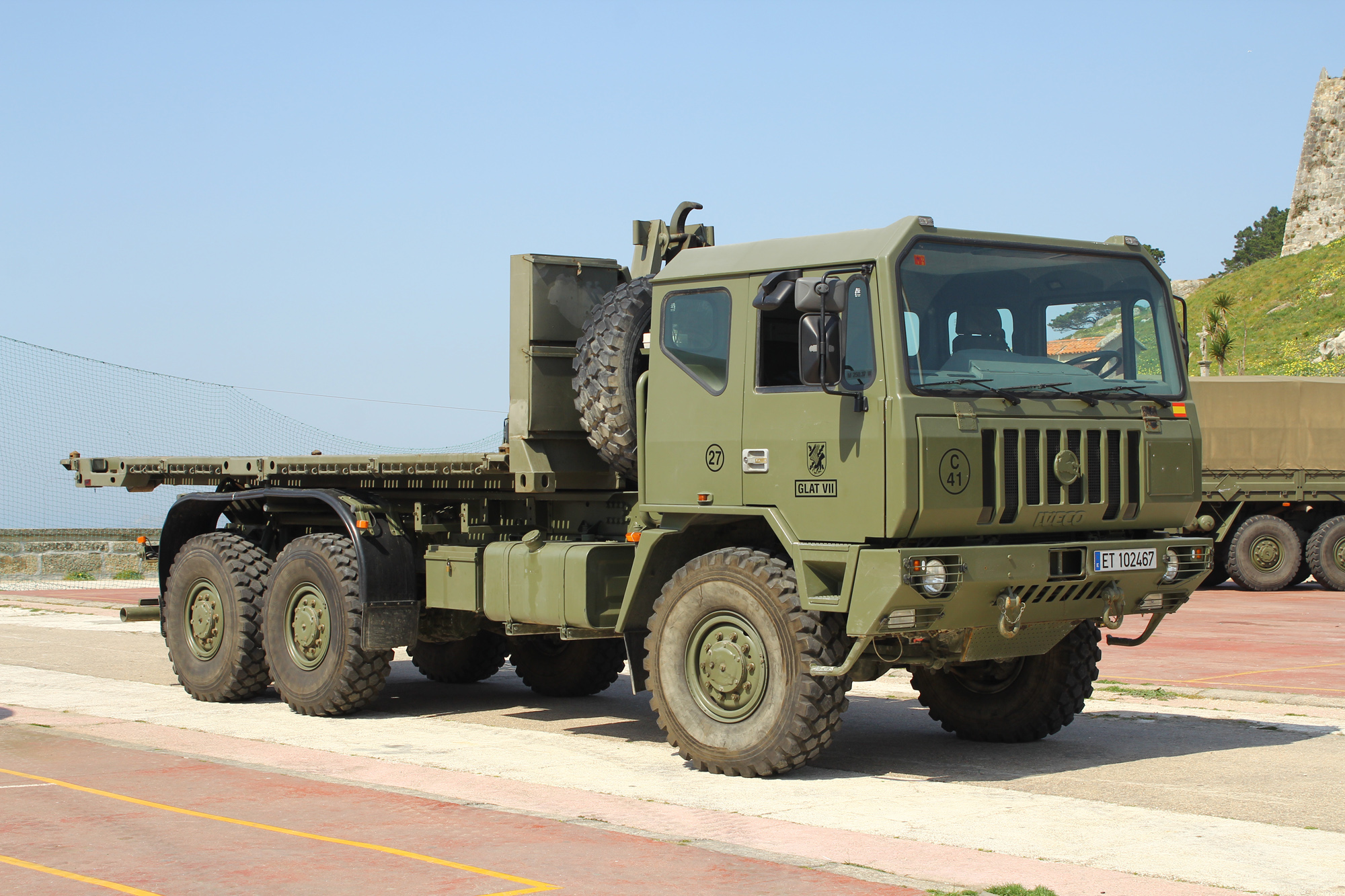 Un camión Iveco-Pegaso M.250.37WM 6×6 de 10 Tm en versión VEMPAR táctico, en un convoy militar del Grupo Logístico Aerotransportable VII (GLAT VII) de la Brigada de Infantería Ligera Aerotransportable “Galicia” VII (BRILAT) del Ejército de Tierra español, en Bayona, junto al Castillo de Monterreal. Esta unidad militar tiene su sede en el acuartelamiento “General Morillo” de Figueirido, cerca de Pontevedra. The BRILAT in Bayona A truck Iveco-Pegaso M.250.37WM 6×6 of 10 tonnes in tactical VEMPAR version, in a military convoy of the Airborne Logistics Group VII (GLAT VII) of the Airborne Light Infantry Brigade "Galicia" VII (BRILAT) of the Spanish Army in Bayona, near the Castle of Monterreal. This military unit is based in the quarter "General Morillo" of Figueirido, near Pontevedra.